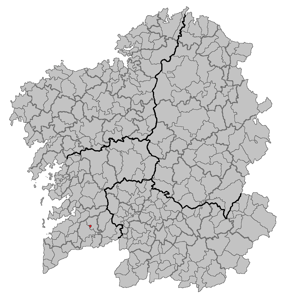 Mapa coa localización do concello de Mondariz-Balneario.